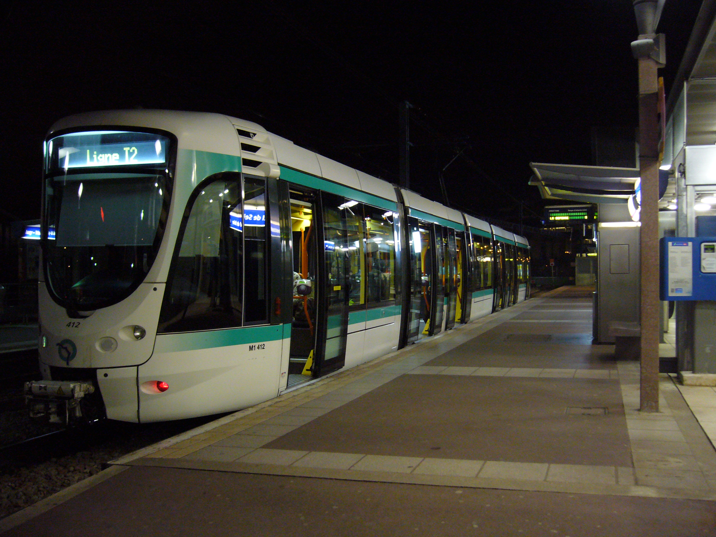 Un Citadis 302 à quai de nuit à la station Issy Val de Seine sur la ligne T2 du tramway d'Île-de-France.